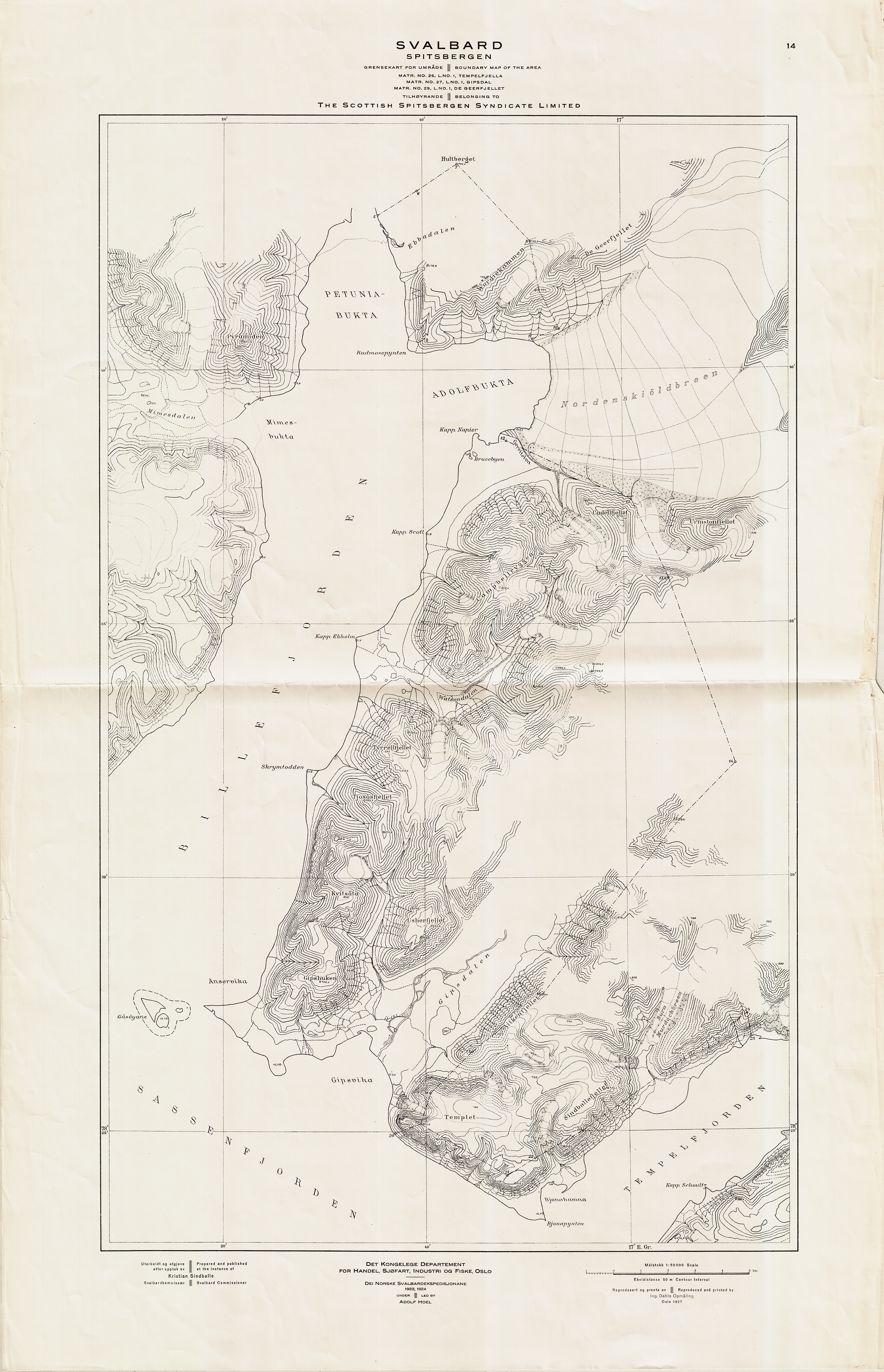 Kart over Billefjorden på Svalbard. Oppmålt 1923 og 1924 ledet av Adolf Hoel. Utgitt 1927 av Ing. Dahls Opmåling. Målestokk 1: 50 000